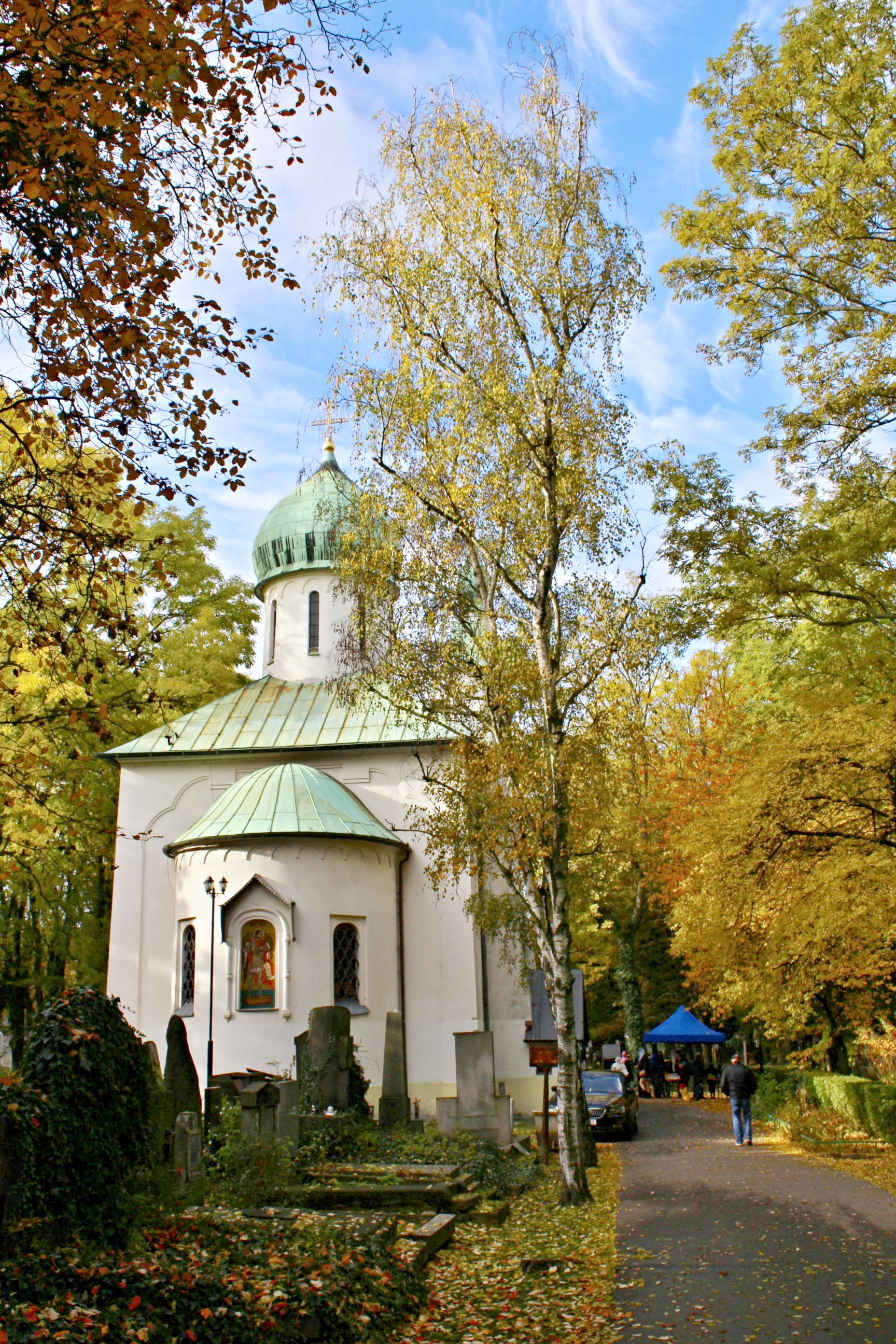 Chrám Zesnutí přesvaté Bohorodice na Olšanech